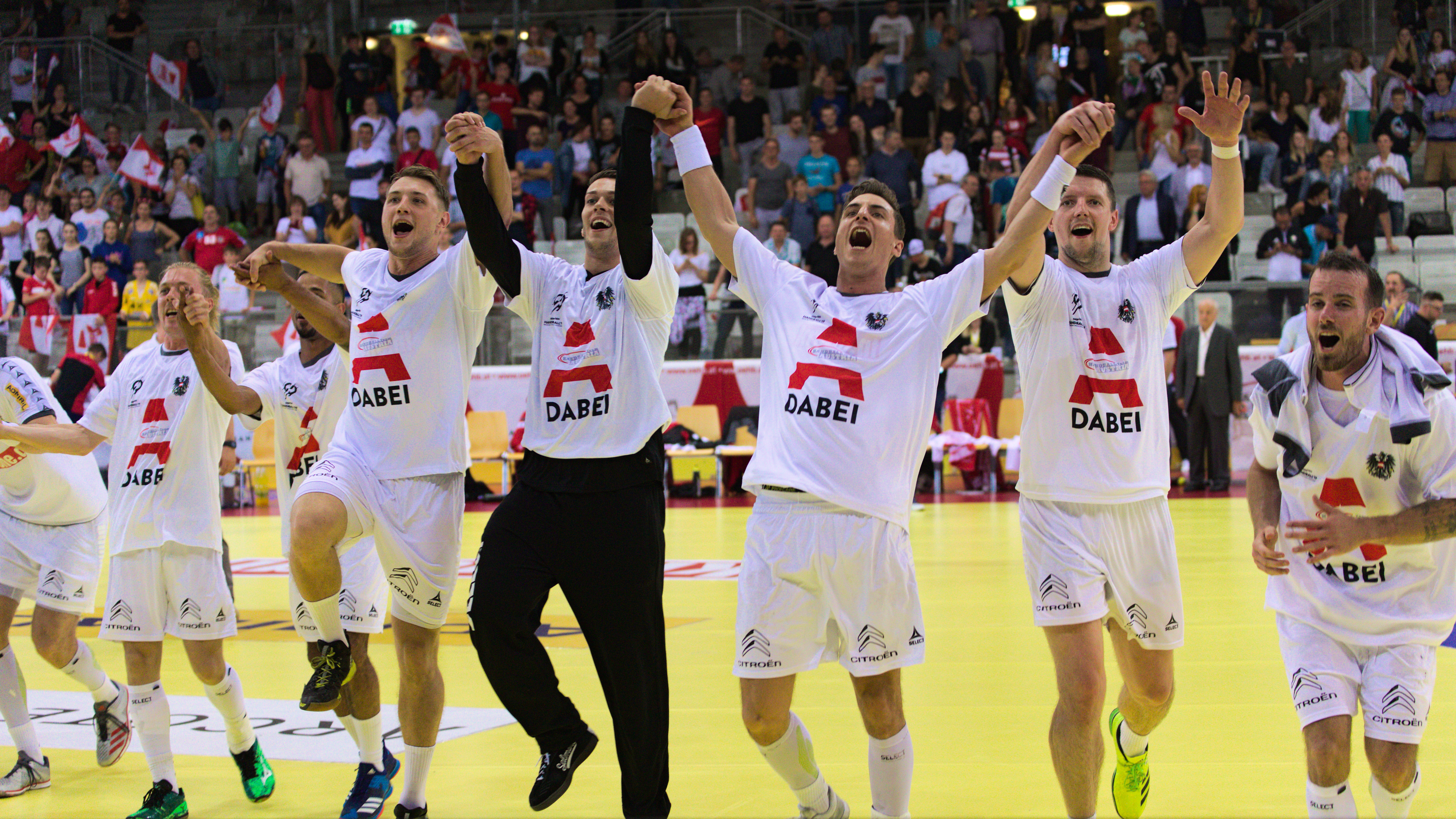 Handball-WM-Qualifikationsspiel zwischen Österreich und Weißrussland in Wien, 13. Juni 2018: die österreichische Mannschaft beim Jubeln